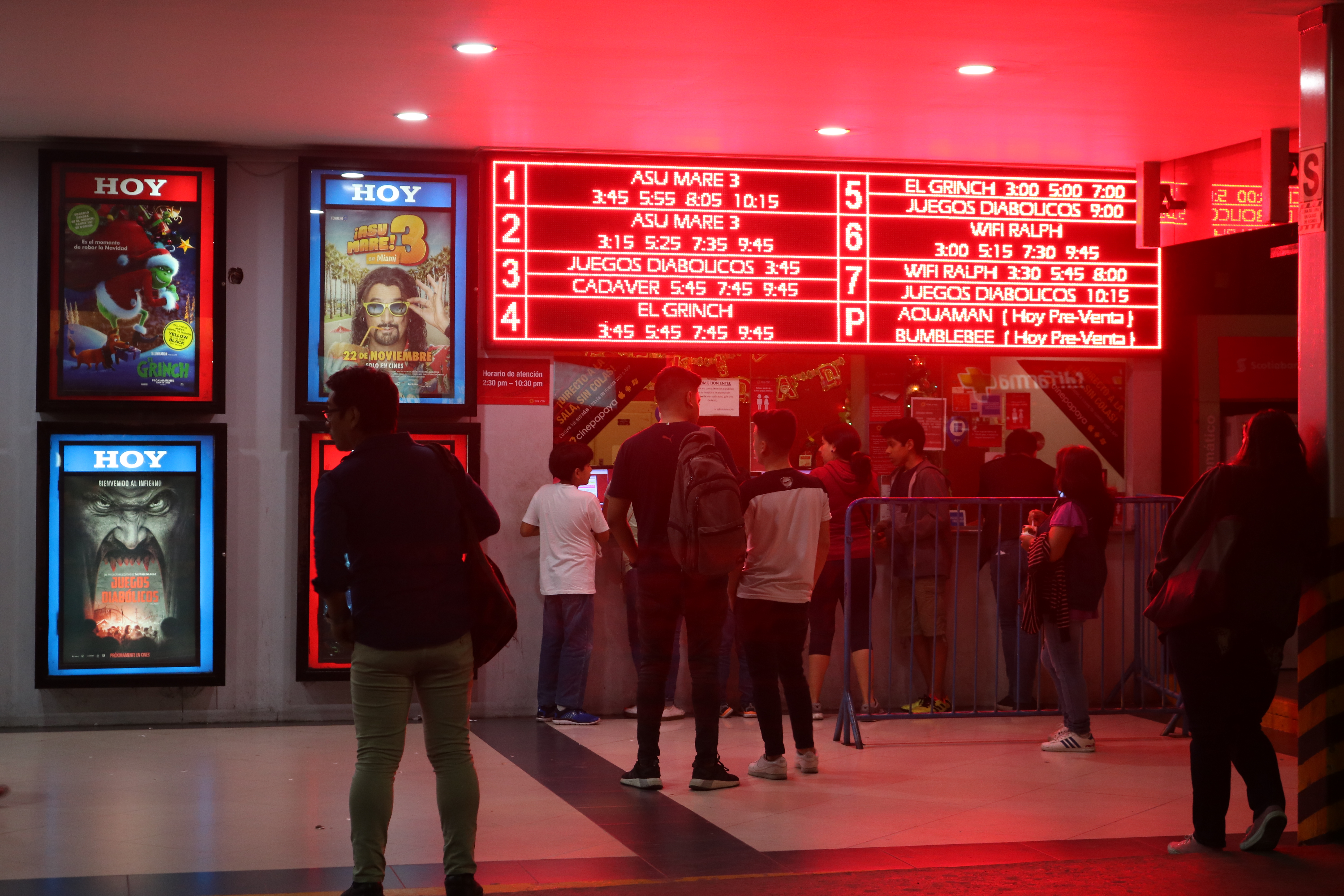 Boleteria del Cine Star Metro en el distrito de Breña, Lima, Perú.